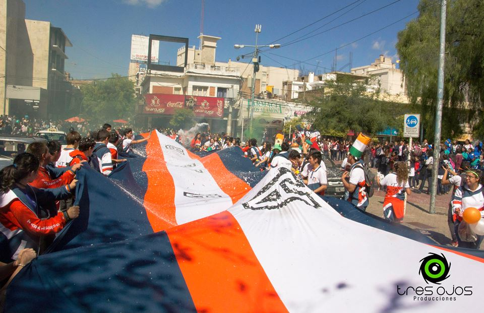 Presentación Tabaleros 2015 en el centro de la cuidad